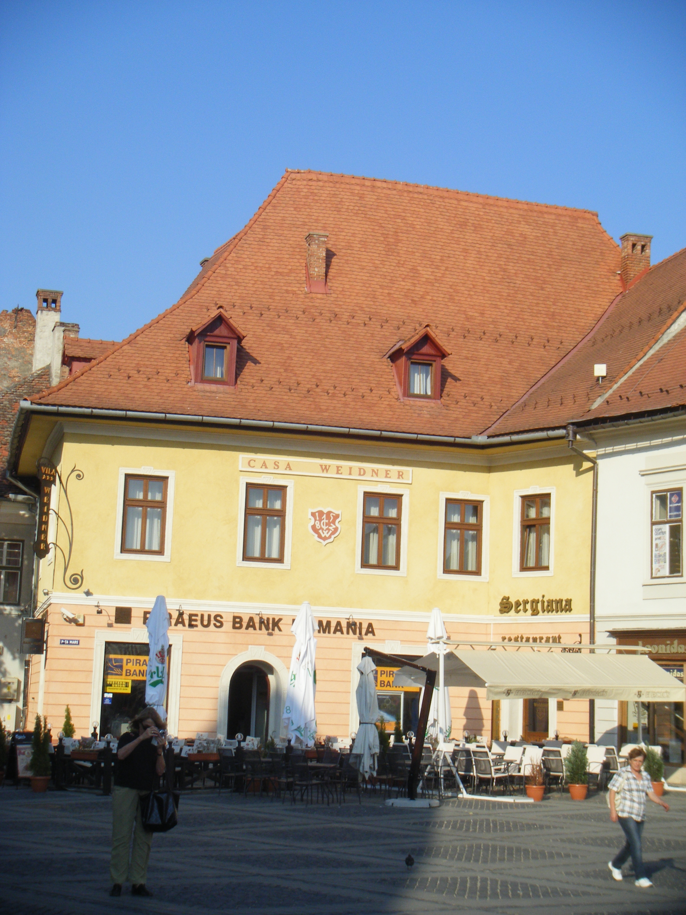 Casa Weidner Sibiu